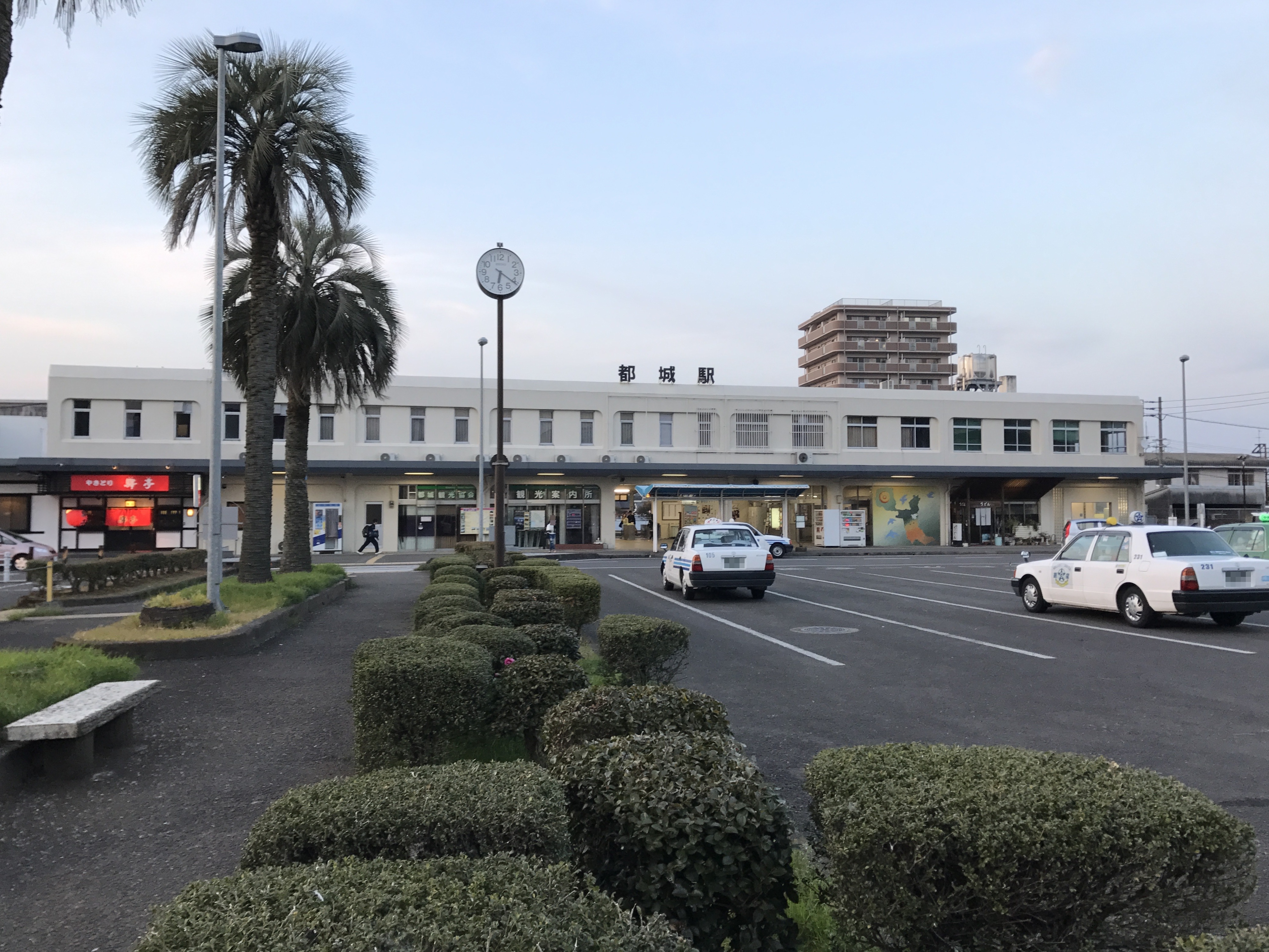 都城駅駅舎